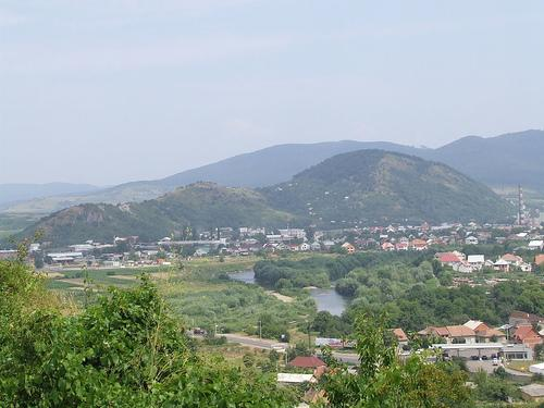 Panoramo de Mukaĉeve.